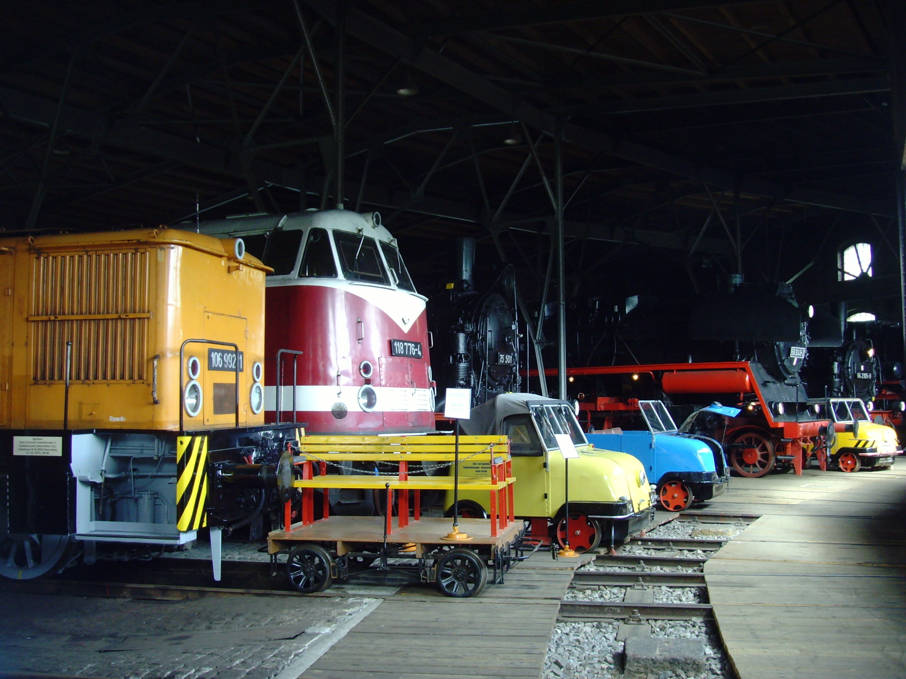 045 Eisenbahnmuseum Schwarzenberg